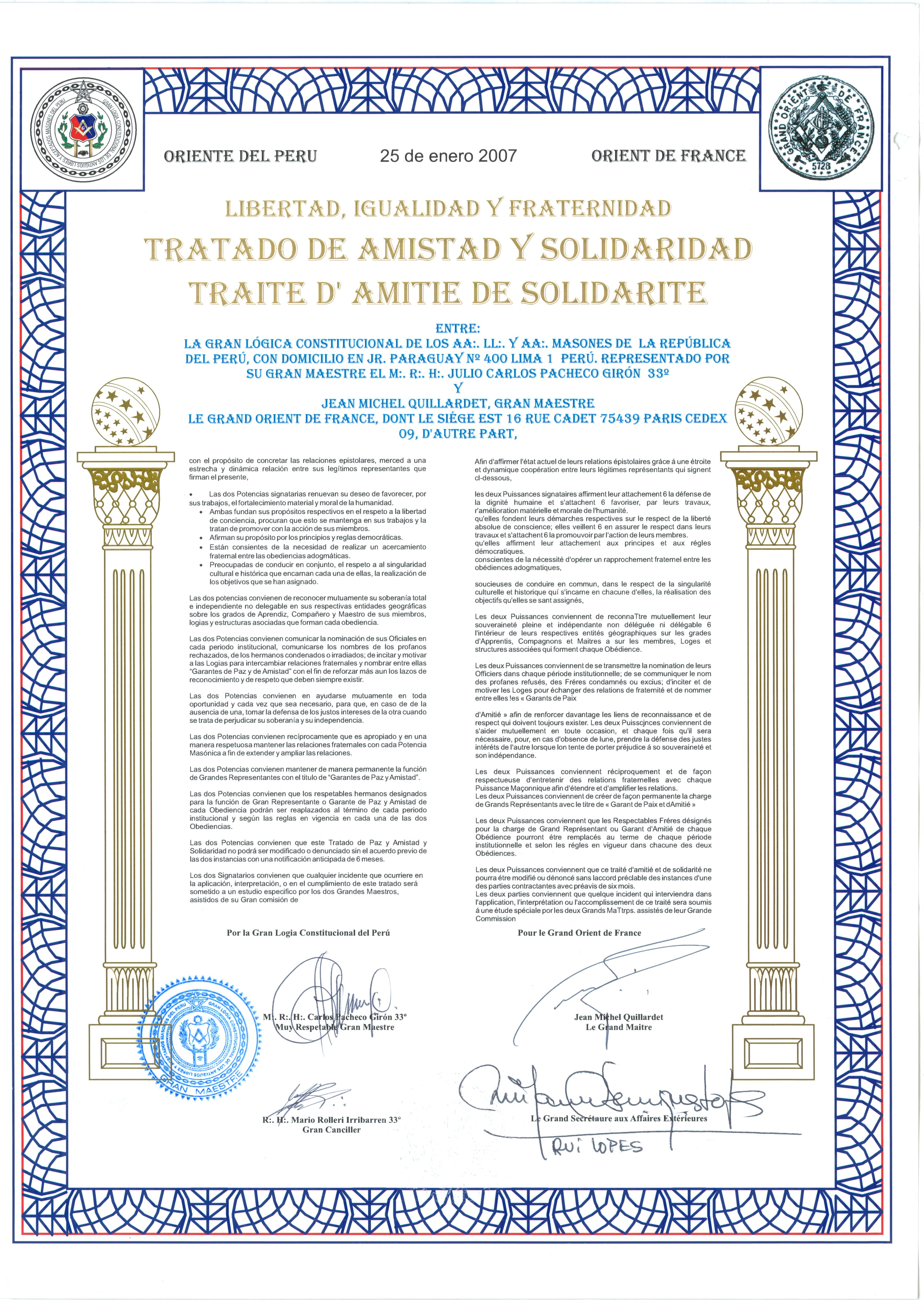 TRATADO DE AMISTAD Y CORRESPONDENCIA MASONICA ENTRE GRAN LOGIA CONSITUCIONAL DEL PERU Y EL GRAN ORIENTE DE FRANCIA